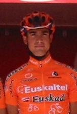 Euskaltel-Euskadi, Euskal Bizikleta 2005